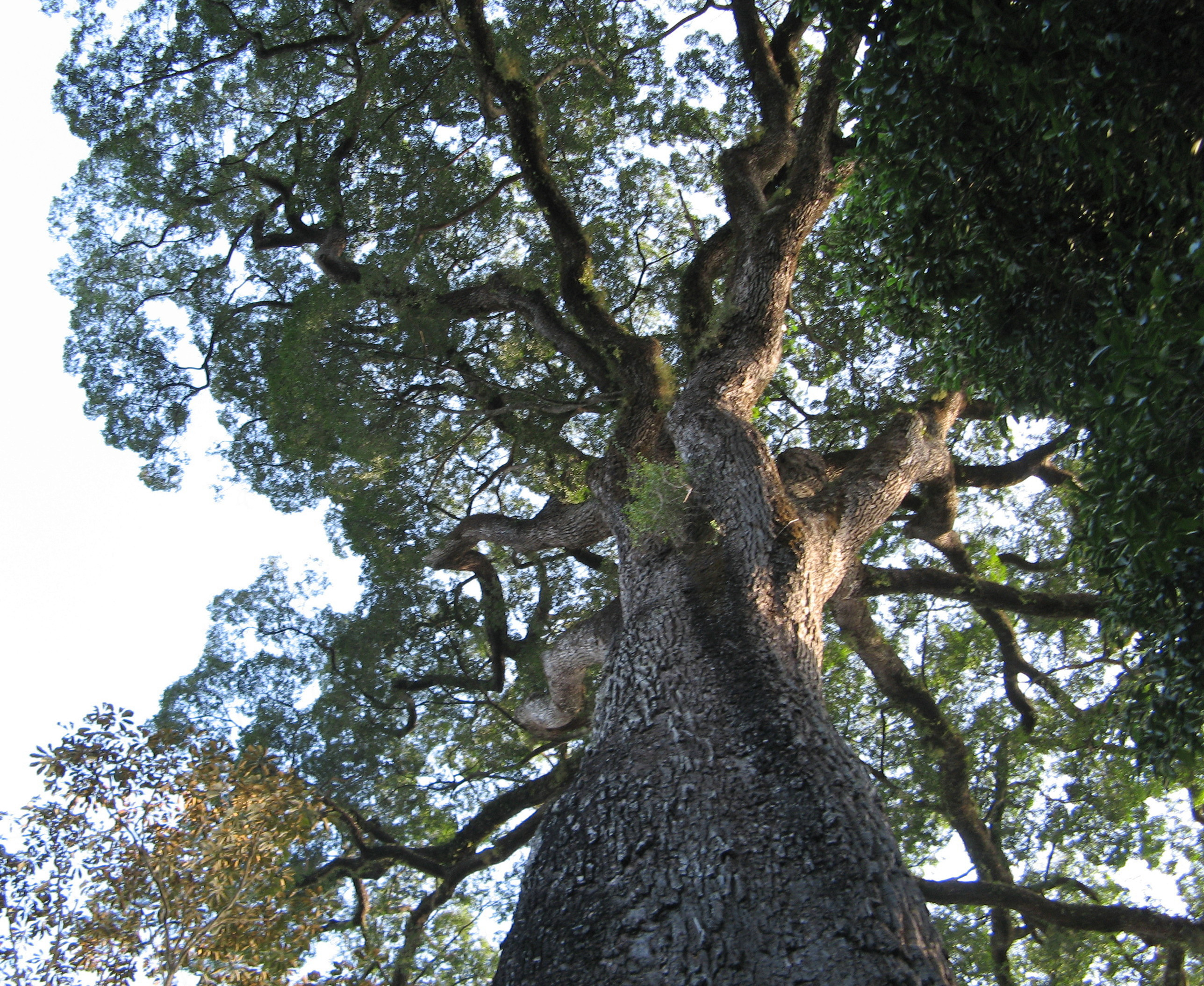 jequitiba rosa gigante de 3.000 anos